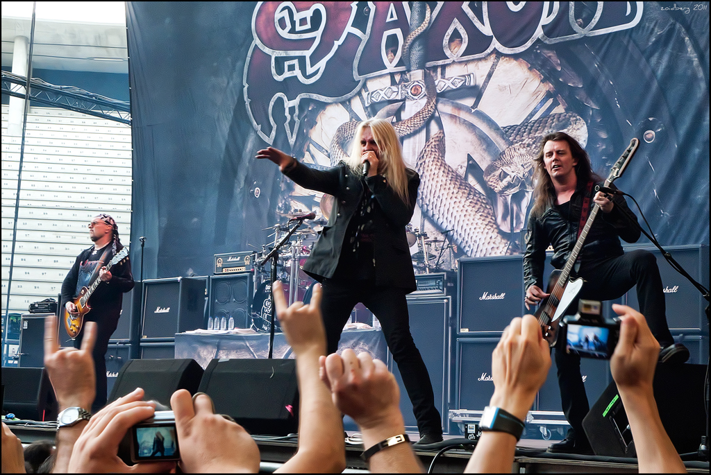 Saxón actuando en Leganés (Madrid) el 30 de julio de 2011.